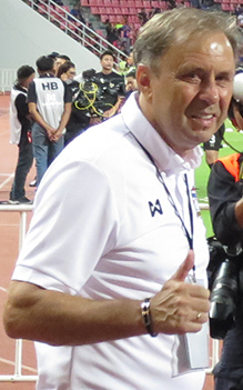 Milovan Rajevac